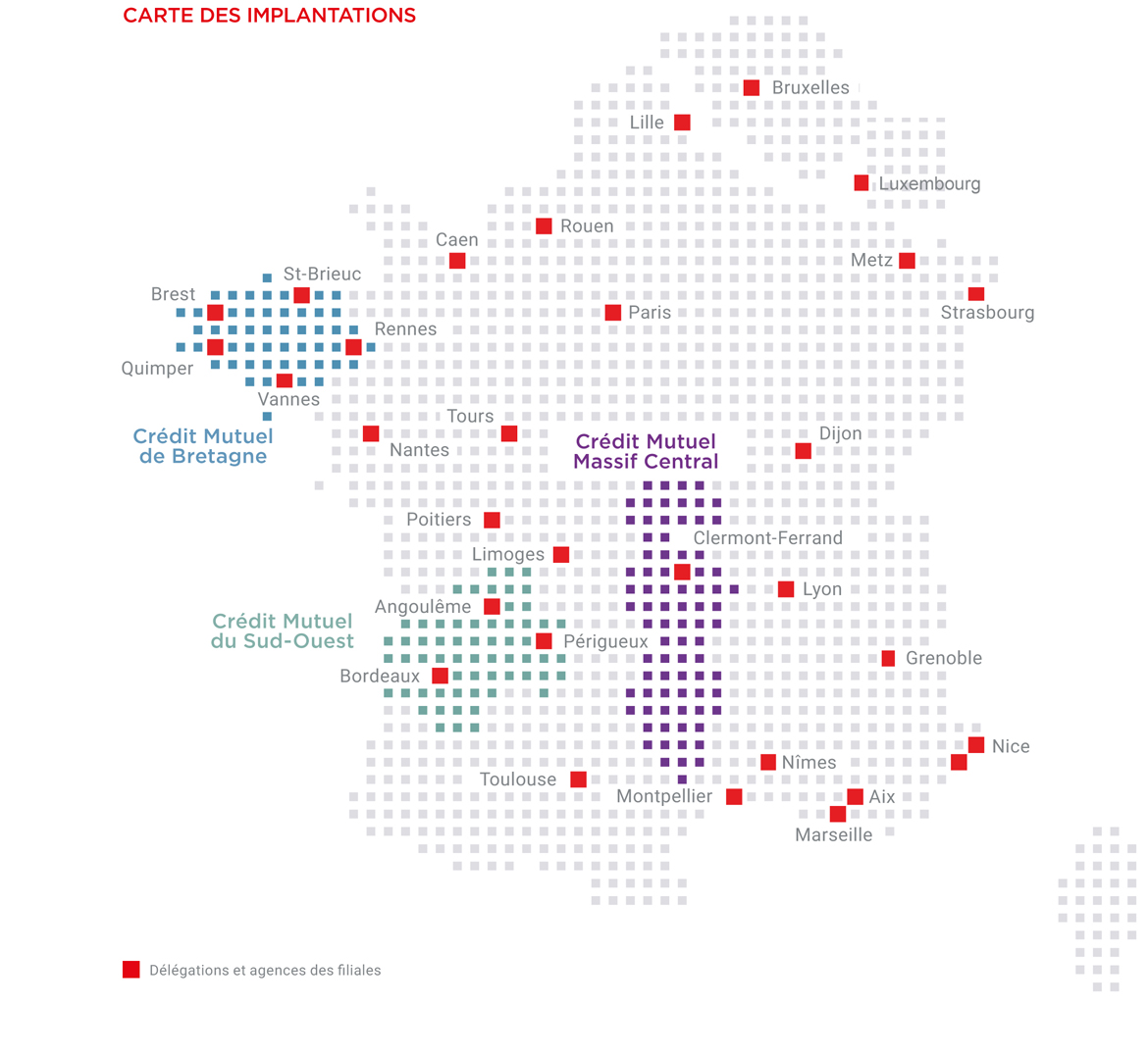 Carte d'implantation du Crédit Mutuel Arkéa (2016)